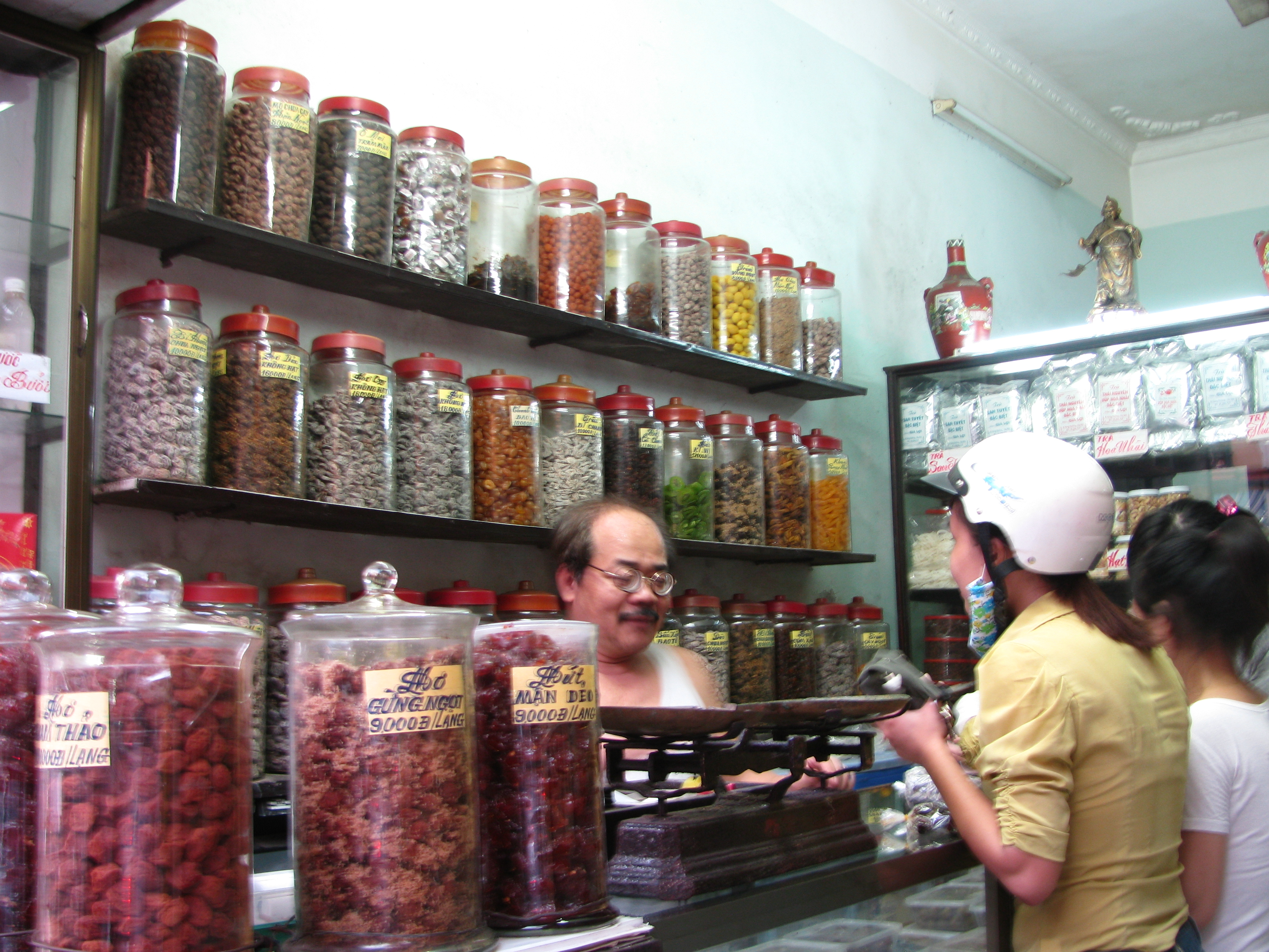 Một cửa hàng bán ô mai (xí muội) trên phố Hàng Đường (Hà Nội)